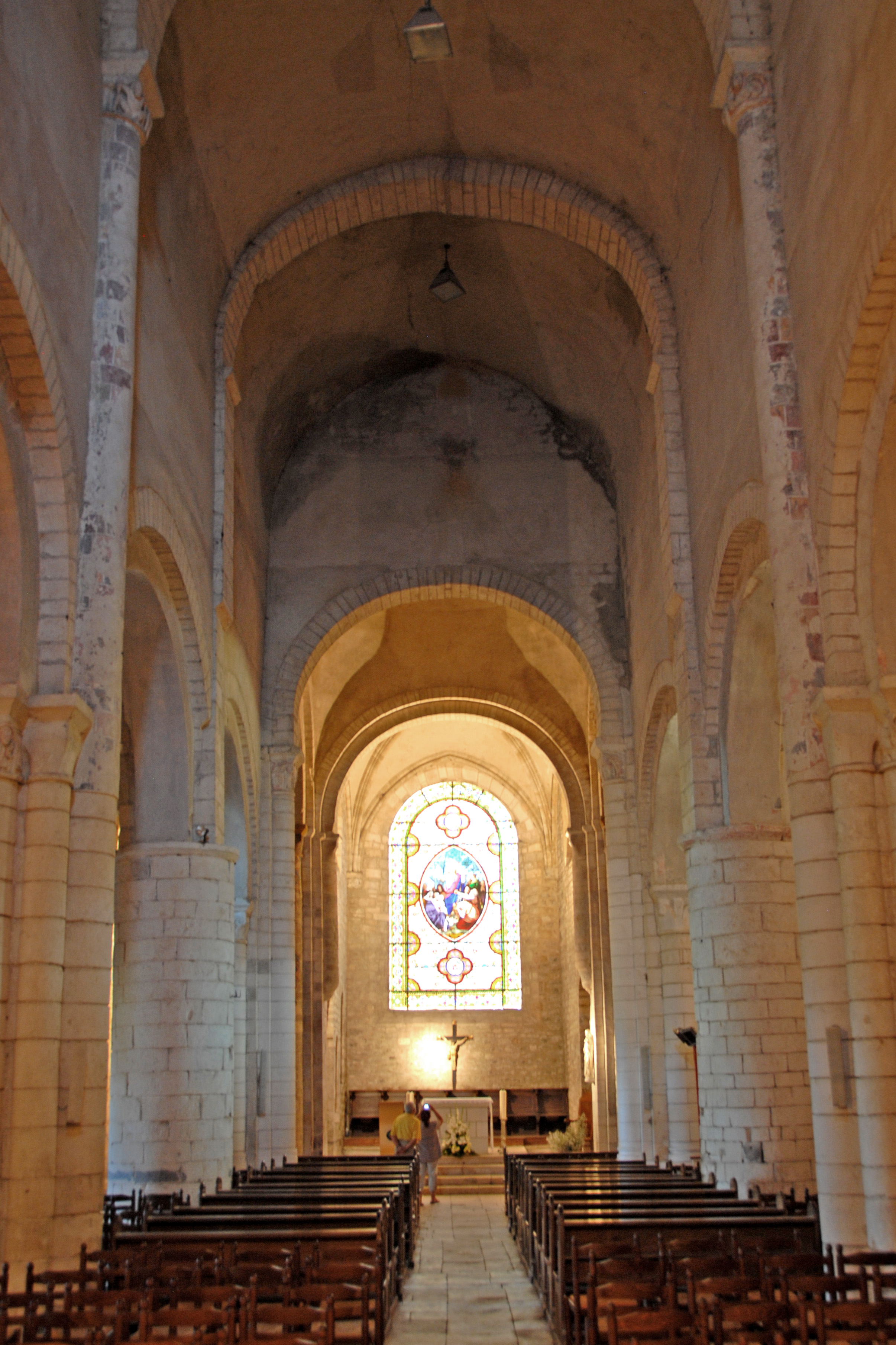 Abteikirche, Mittelschiff